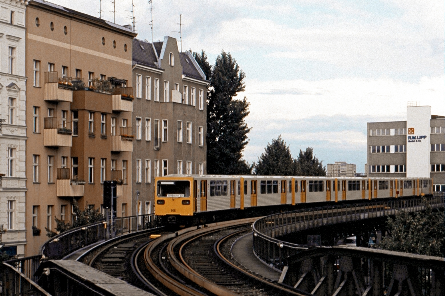 Berlin Hochbahn Oberbaumstraße mit Zug der Baureihe GI